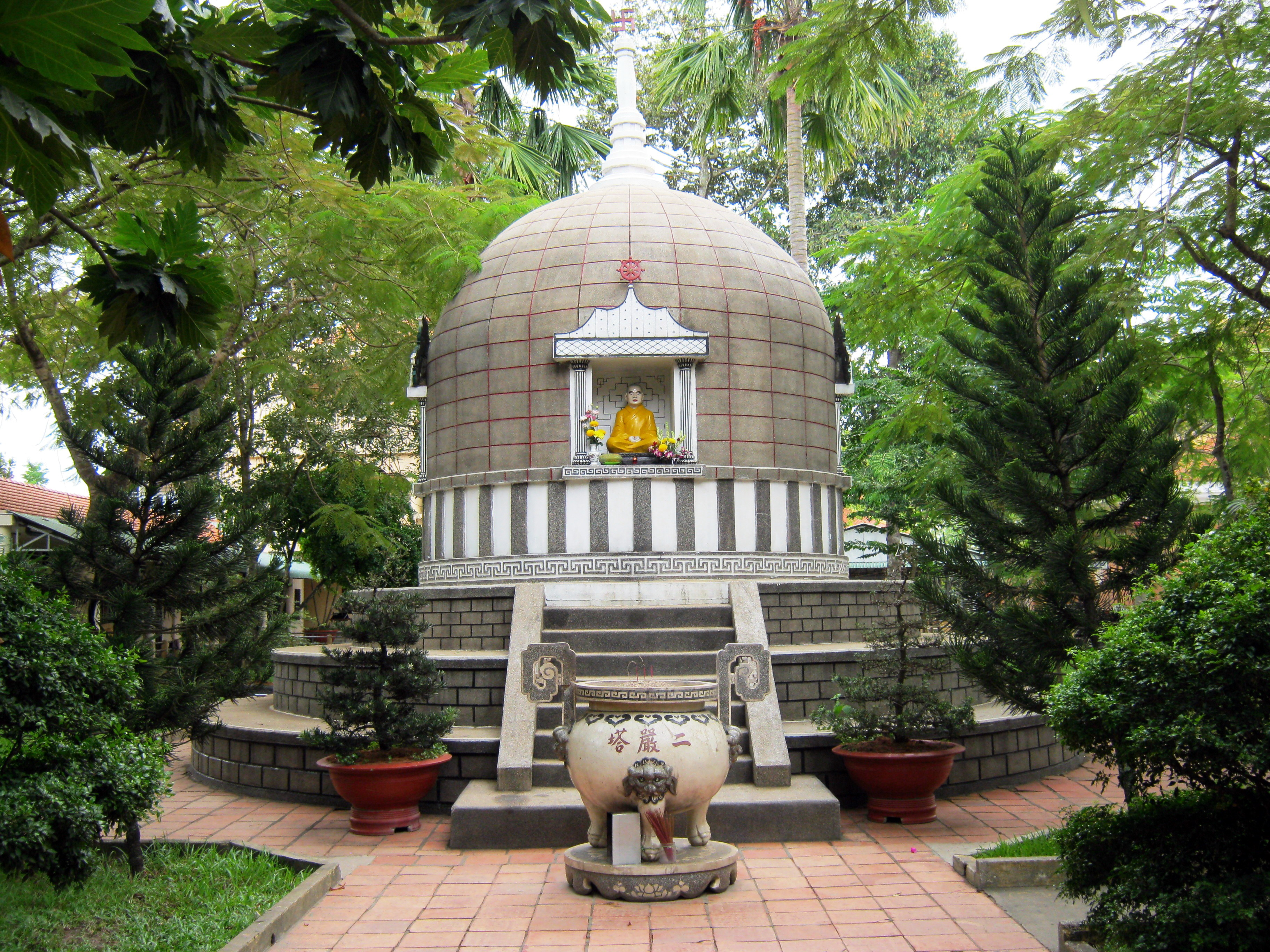 Tháp Nhị Nghiêm là nơi an trí nhục thân cố Hòa Thượng Ngộ Chân Tử, người lập chùa Hoằng Pháp ở Hóc Môn, Thành phố Chí Minh (Việt Nam).